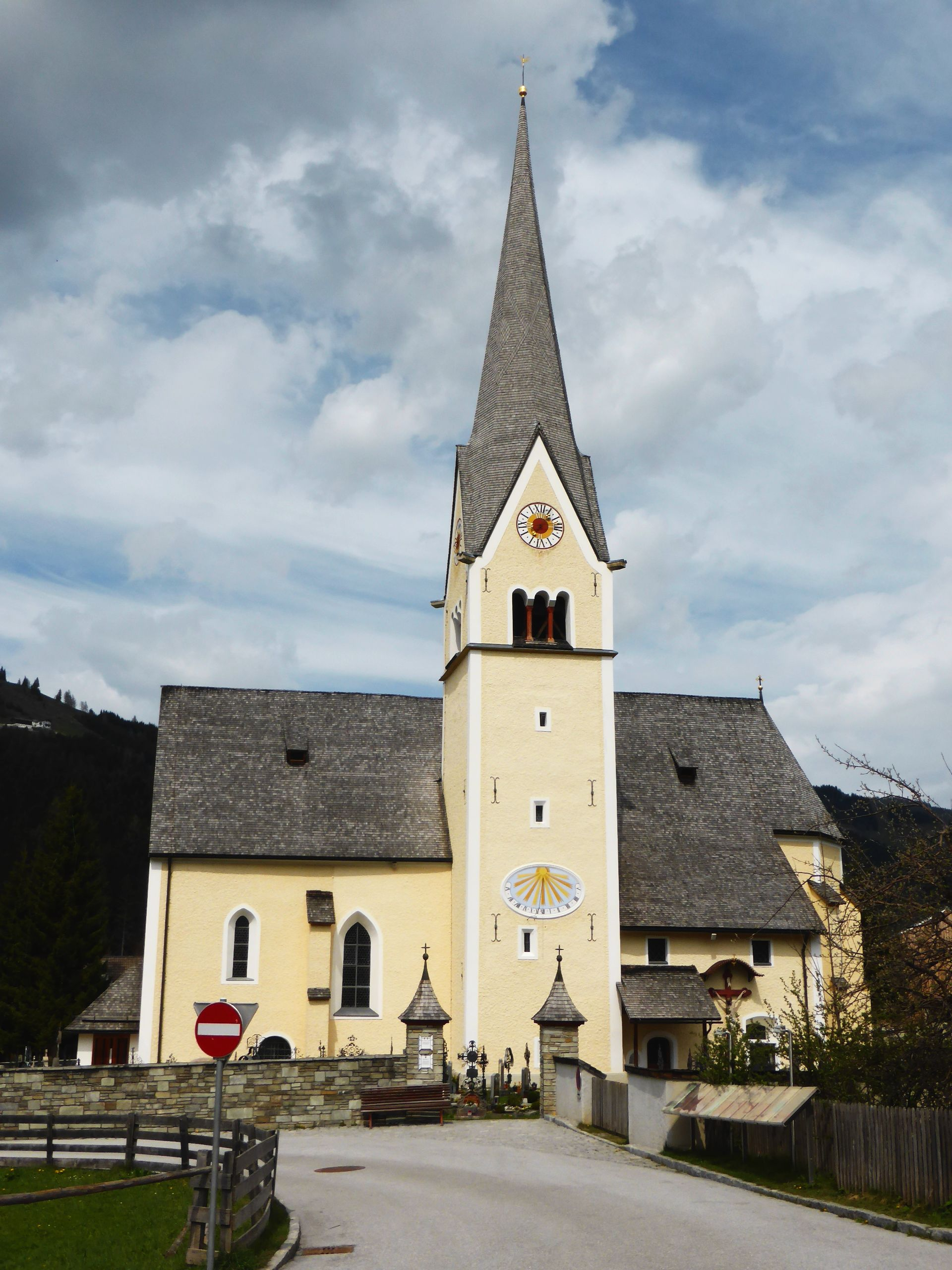 Kath. Pfarrkirche hl. Rupert